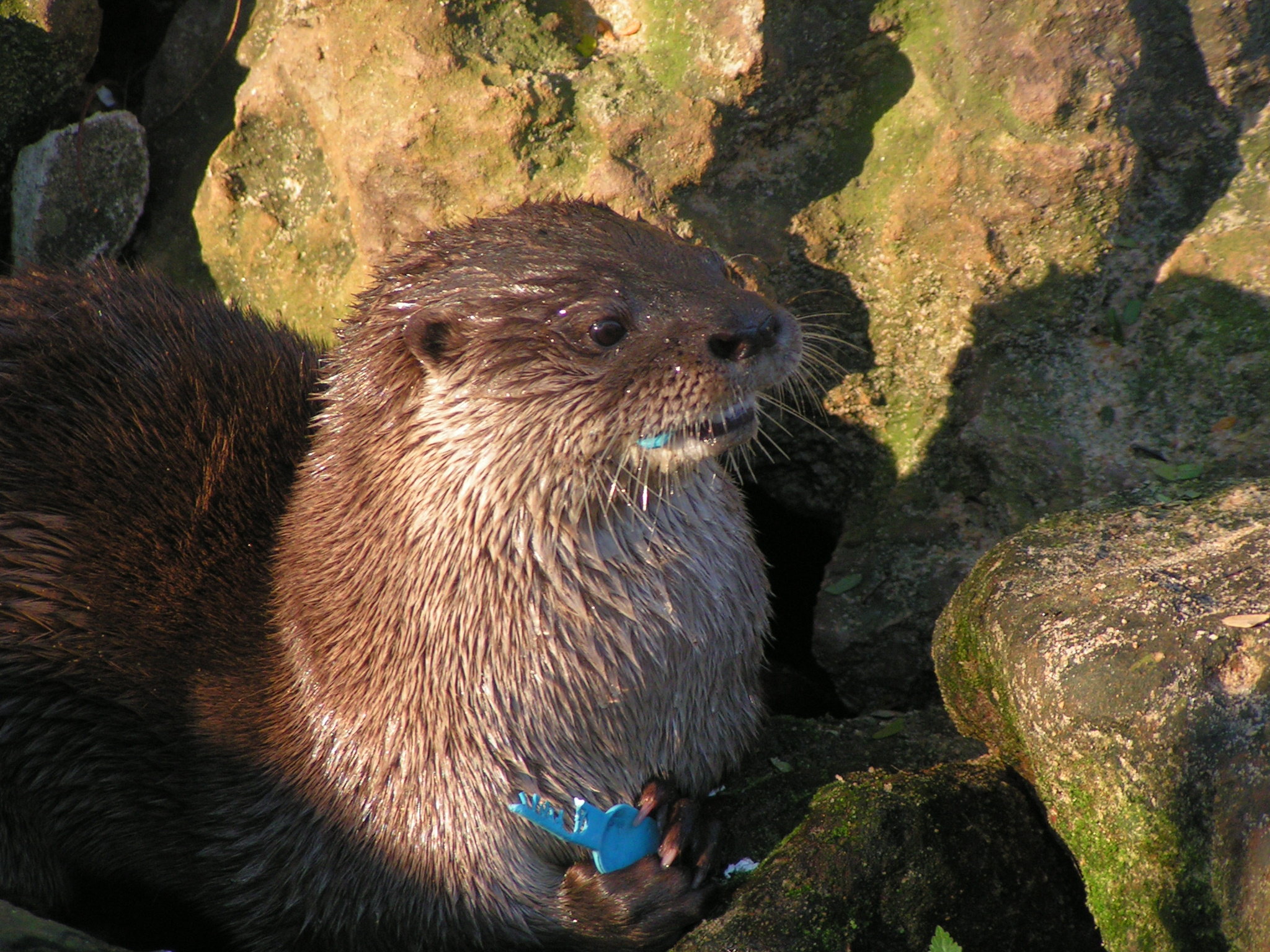 Lobito de río (Lontra longicaudis)